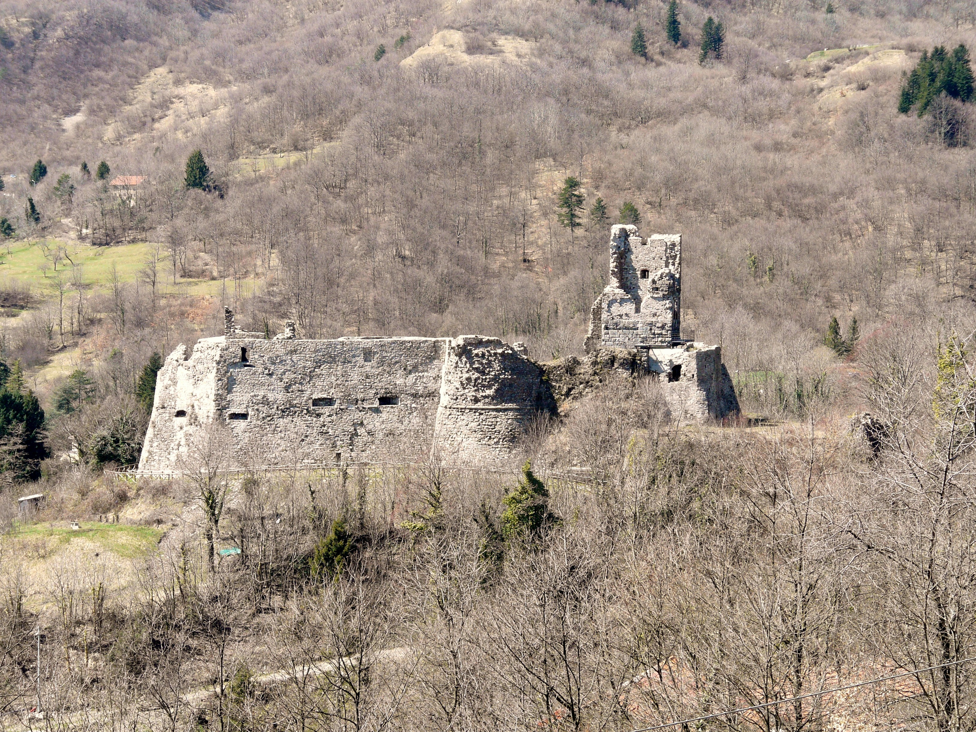 Ruderi del castello, Torriglia, Liguria, Italia